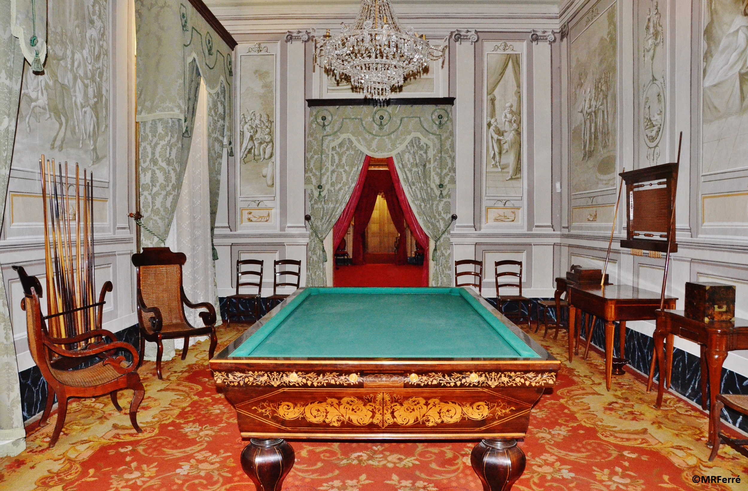 Interior de la sala de jocs del Museu Romàntic Can Papiol, Vilanova i la Geltrú (Catalonia).